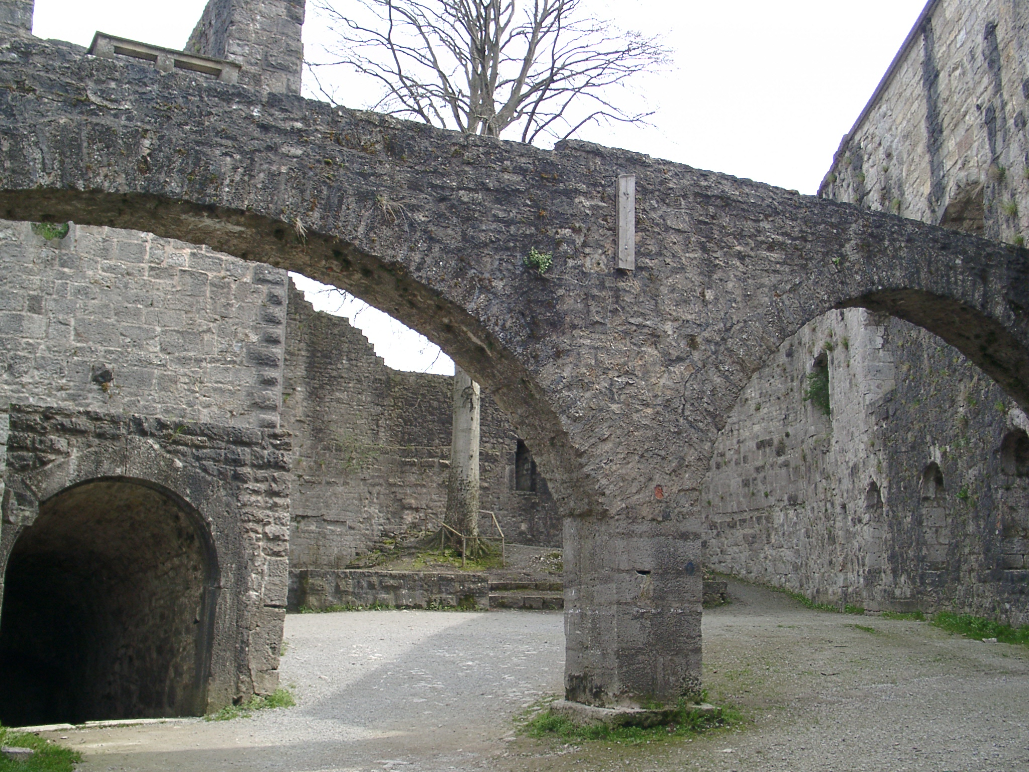 Burg Leofels, Ilshofen. Innenansicht der Ruine.